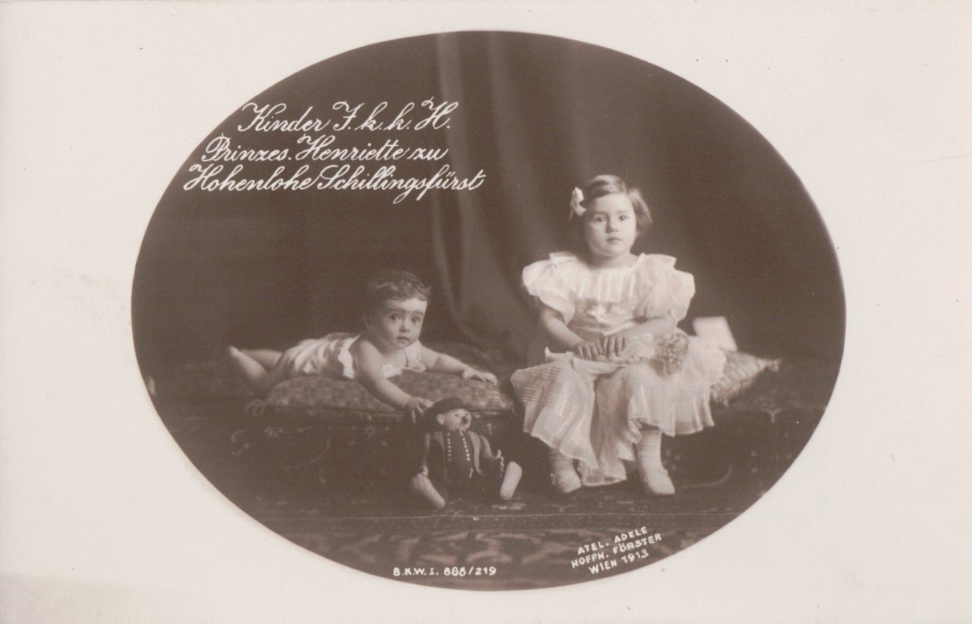 Zwei Kinder der Prinzessin (Maria) Henriette von Hohenlohe-Schillingsfürst (1883-1956)) Princess Elisabeth of Hohenlohe-Waldenburg-Schillingsfürst (27 September 1909 – 30 March 1987) Princess Natalie of Hohenlohe-Waldenburg-Schillingsfürst (28 July 1911 – 11 March 1989)